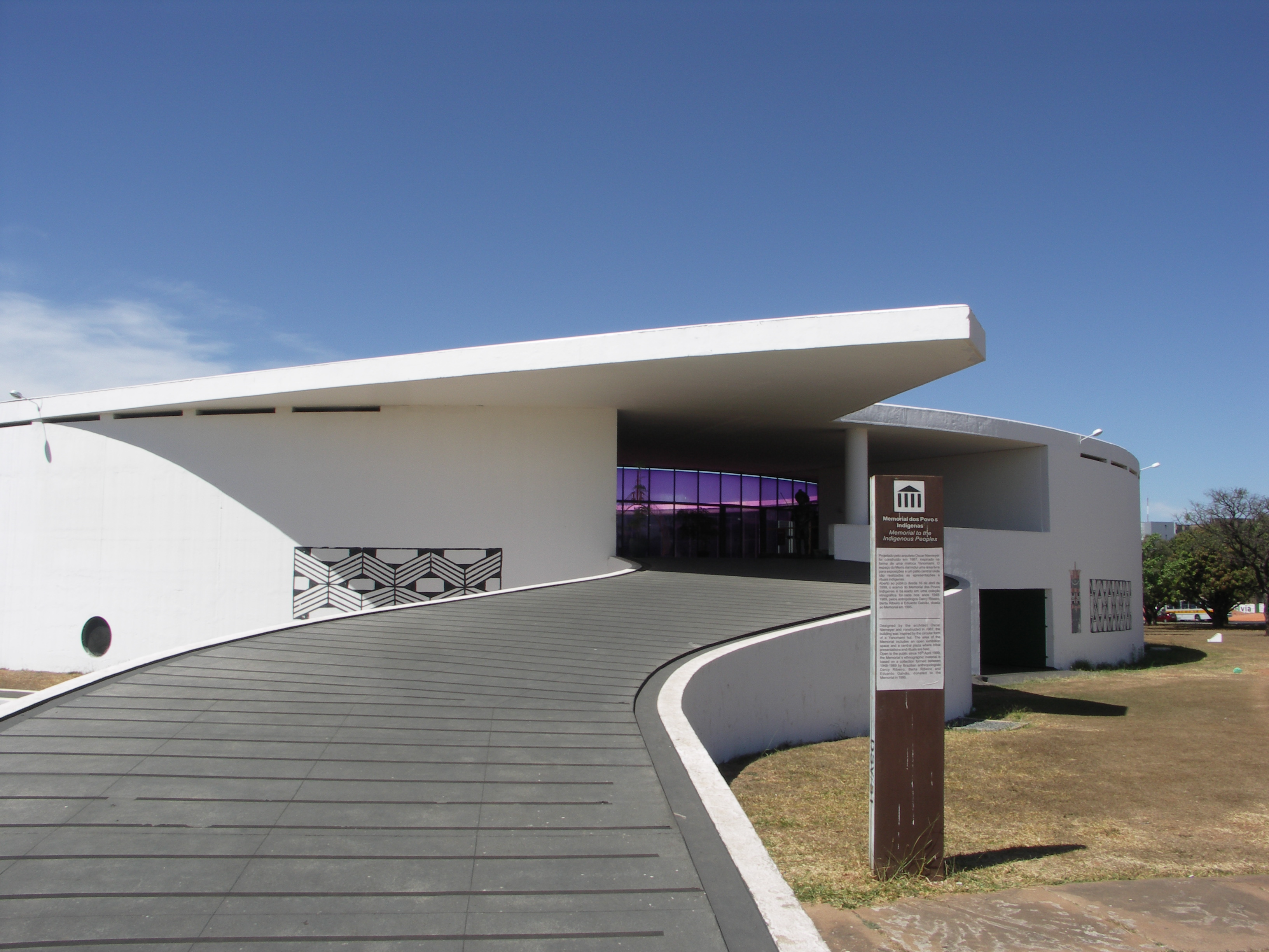 Memorial dos Povos Indígenas